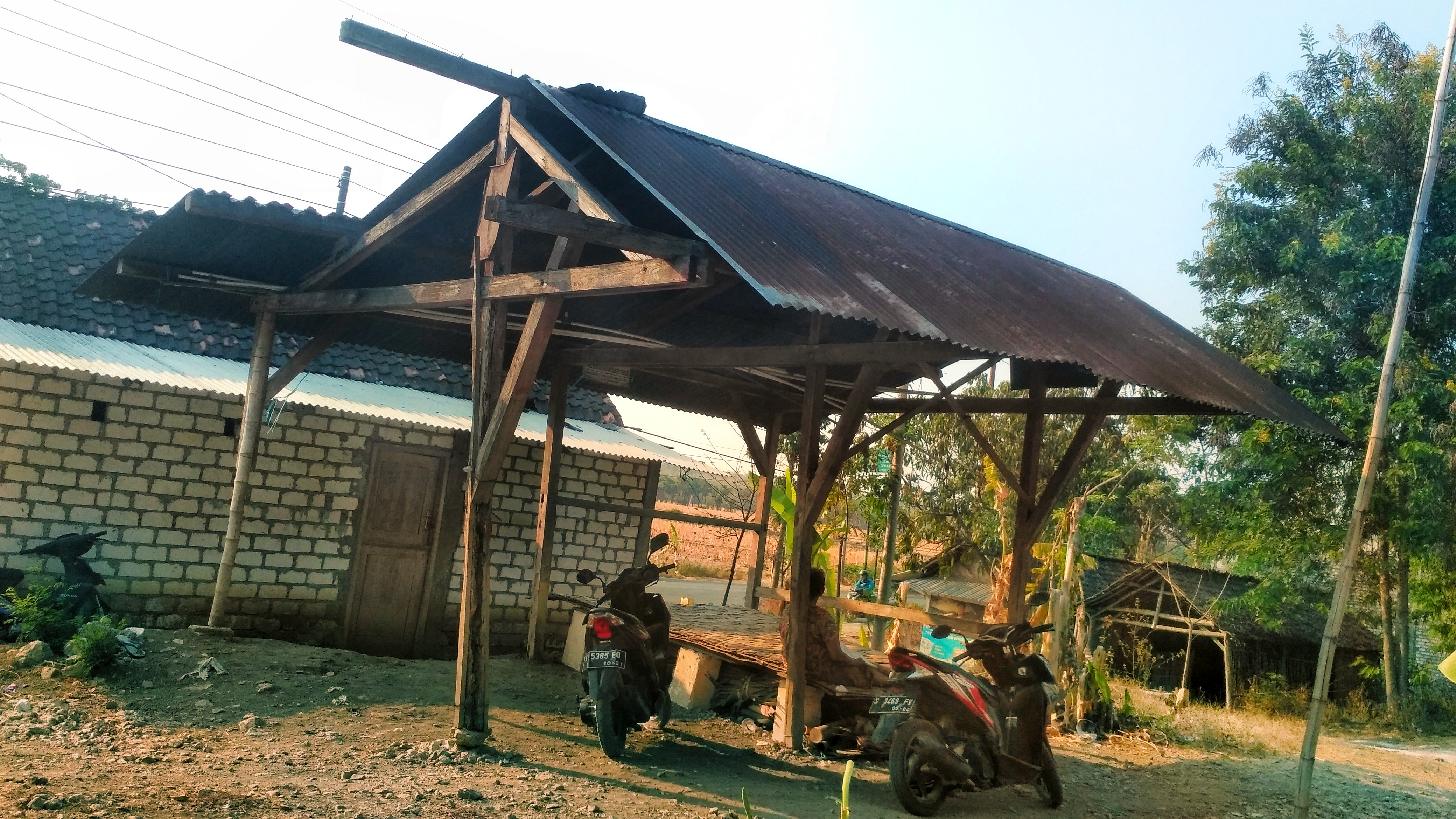 Wujud bangunan Halte Kepet dari arah Utara. Kondisi halte yang terbuat dari material semi permanen ini sudah cukup memprihatinkan karena tiang penyangga sudah rapuh dimakan usia. Bahkan sebenarnya, bangunan Halte Kepet tidak menghadap ke timur seperti saat ini. Melainkan menghadap ke arah barat. Tetapi karena roboh, bangunan halte ini diperbaiki warga setempat dan digeser ke arah barat dan dihadapkan ke arah timur. Walaupun demikian, Halte Kepet ini unik karena menjadi satu-satunya halte kereta api dari kayu yang masih ada di Jalur kereta api Merakurak–Babat. Selain itu, papan nama perhentian kereta api juga masih ada walaupun sudah berkarat.